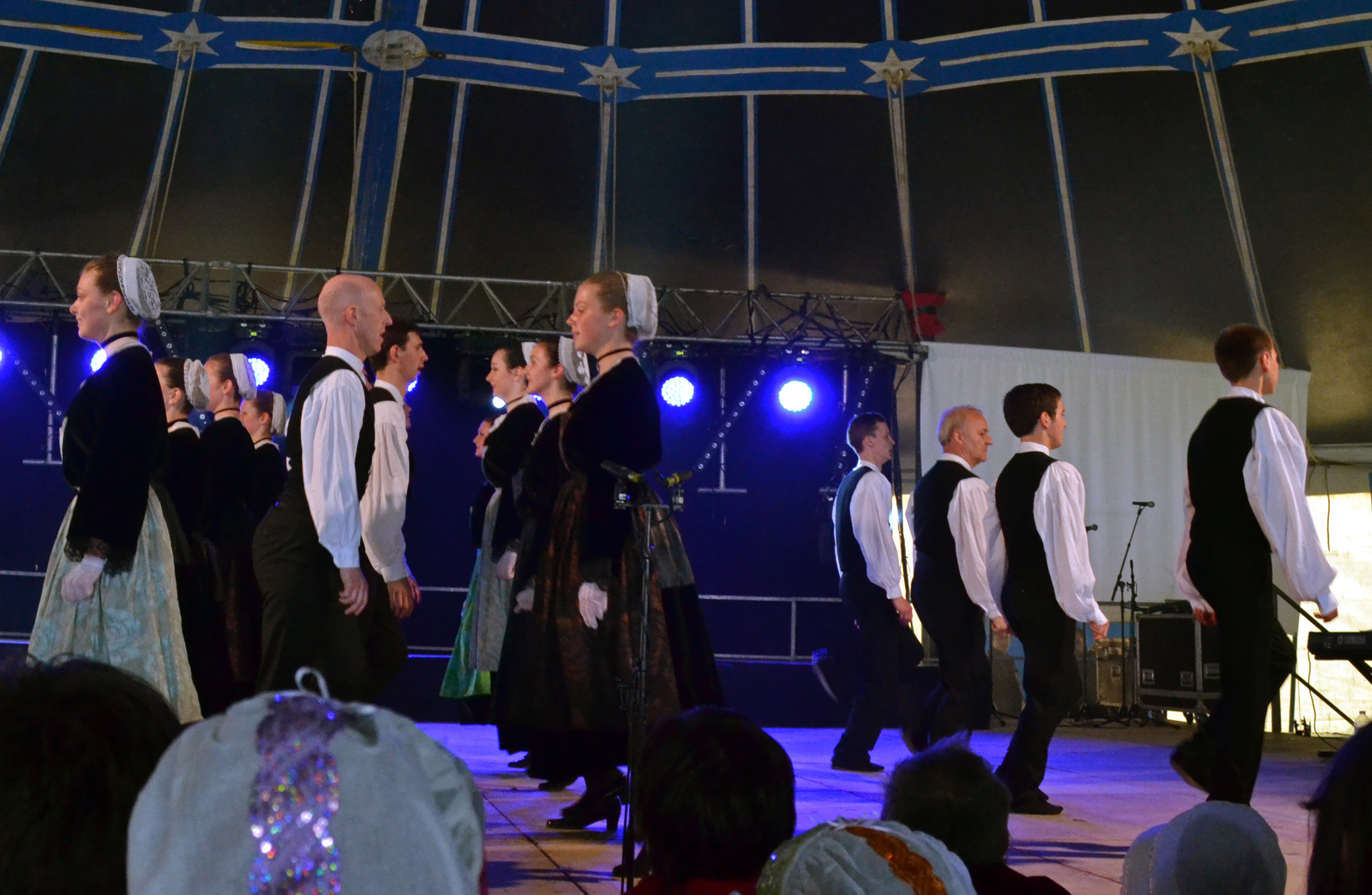 L'Ensemble Bleuniadur, représentant du pays Léonard au Gouel Bro Leon à Plouvorn le 16 juin 2013.